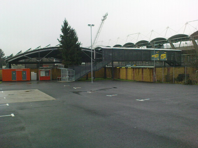 Stahlgang zum neuen Gästesektor der UPC-Arena (vom Einfahrtsbereich des Busparkplatzes gesehen)